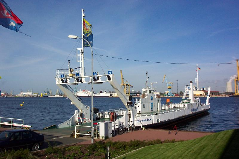 Fähre Schmarl-Oldendorf am Fähranleger Schmarl, Verkehrsverbindung bis zur Eröffnung des Warnowtunnels